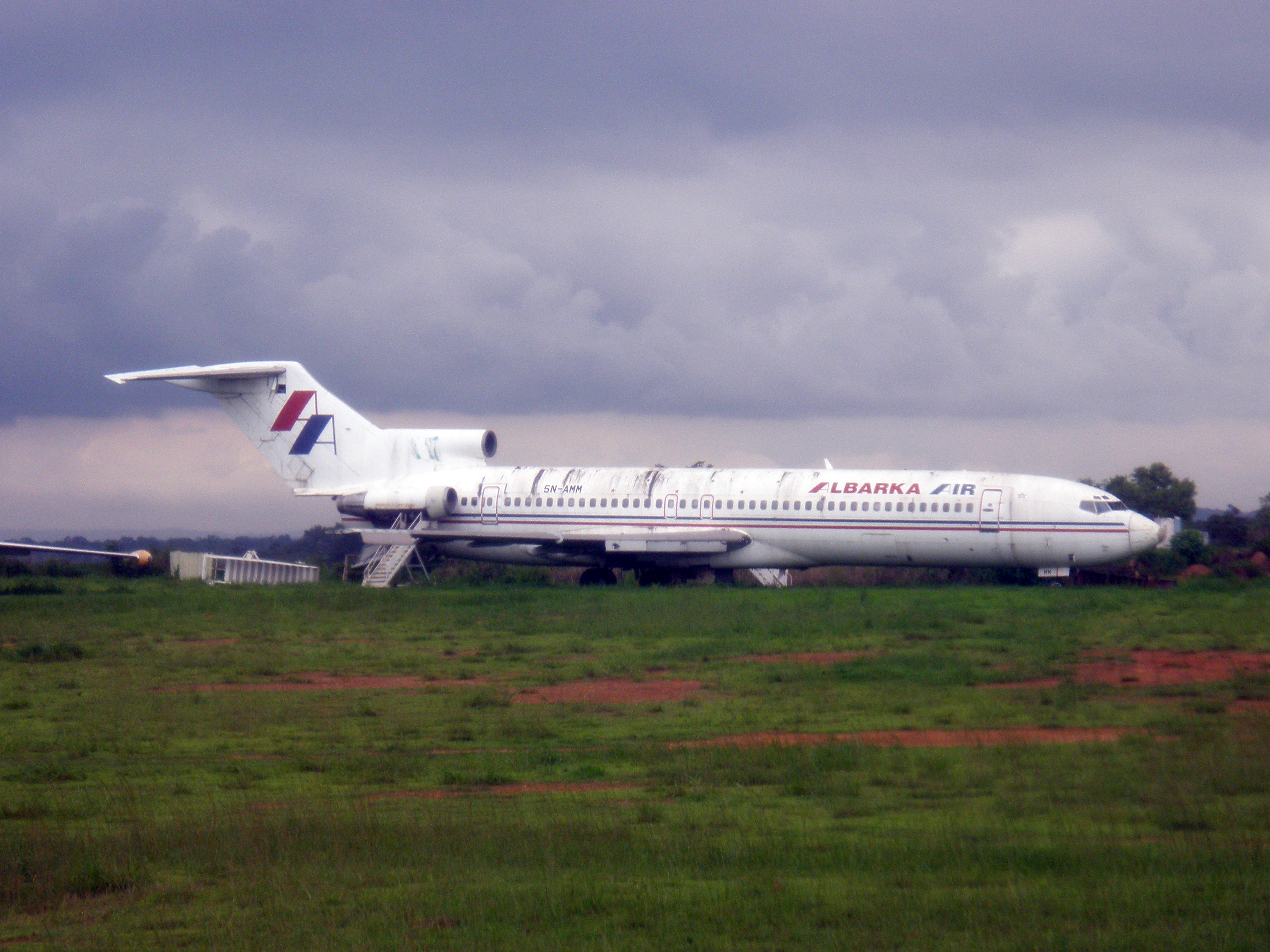 Boeing 727 de Albarka Air abandonado en el Aeropuerto Internacional de Abuya, Nigeria.